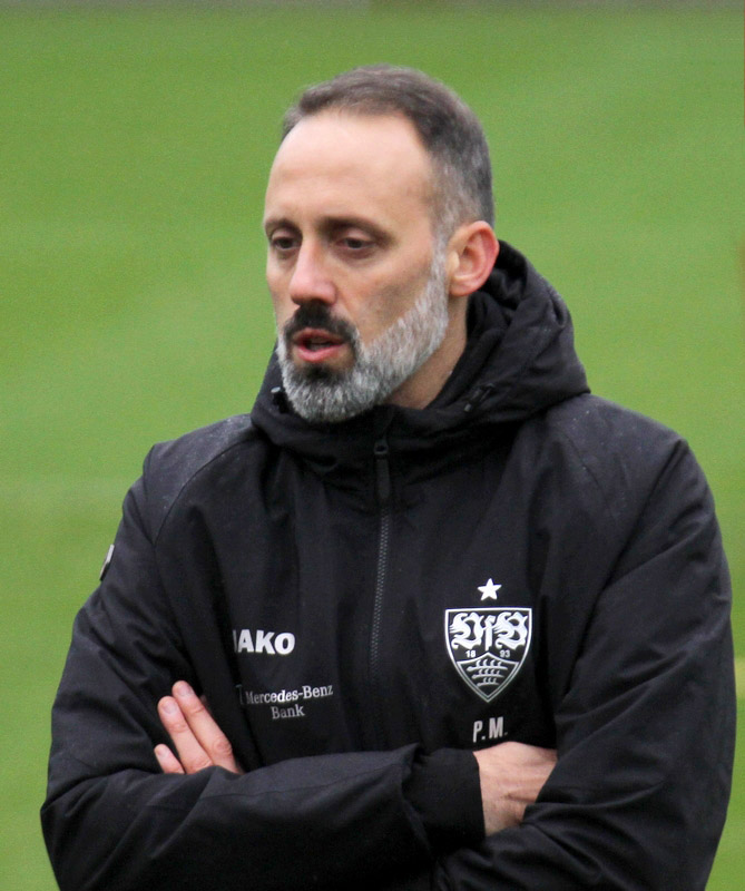 Pellegrino Matarazzo bei seiner ersten Trainingseinheit 2020. Aufgenommen von